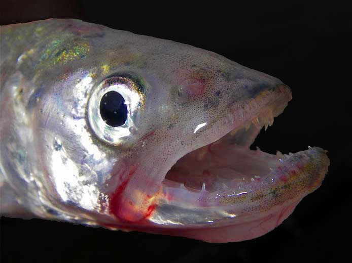 Stint - Kopf und Gebiss